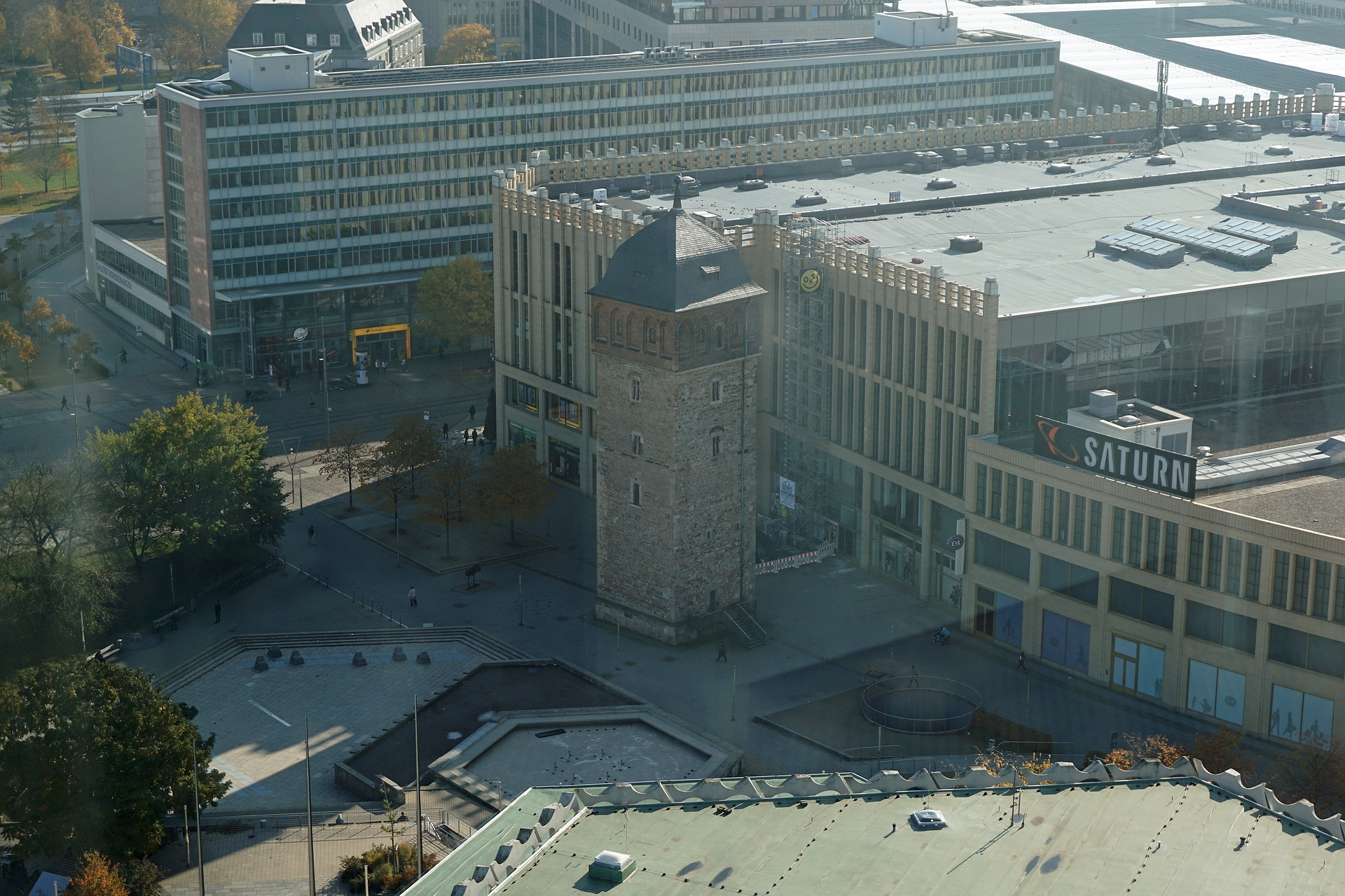 Der Rote Turm in Chemnitz am neu angelegten ehemaligen Verlauf der Stadtmauer